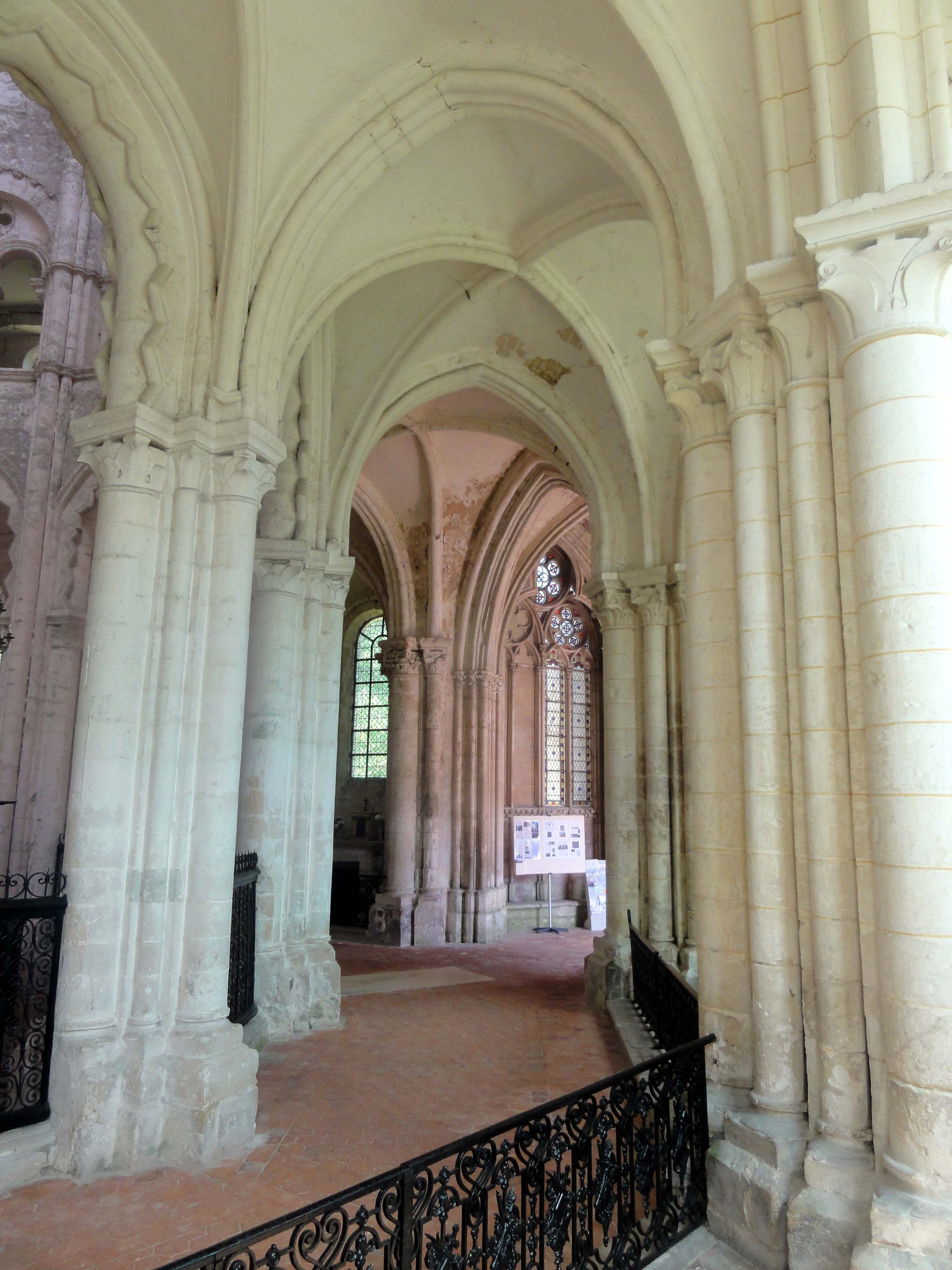 Déambulatoire de l'abbatiale et chapelles rayonnantes - voir le titre du fichier.